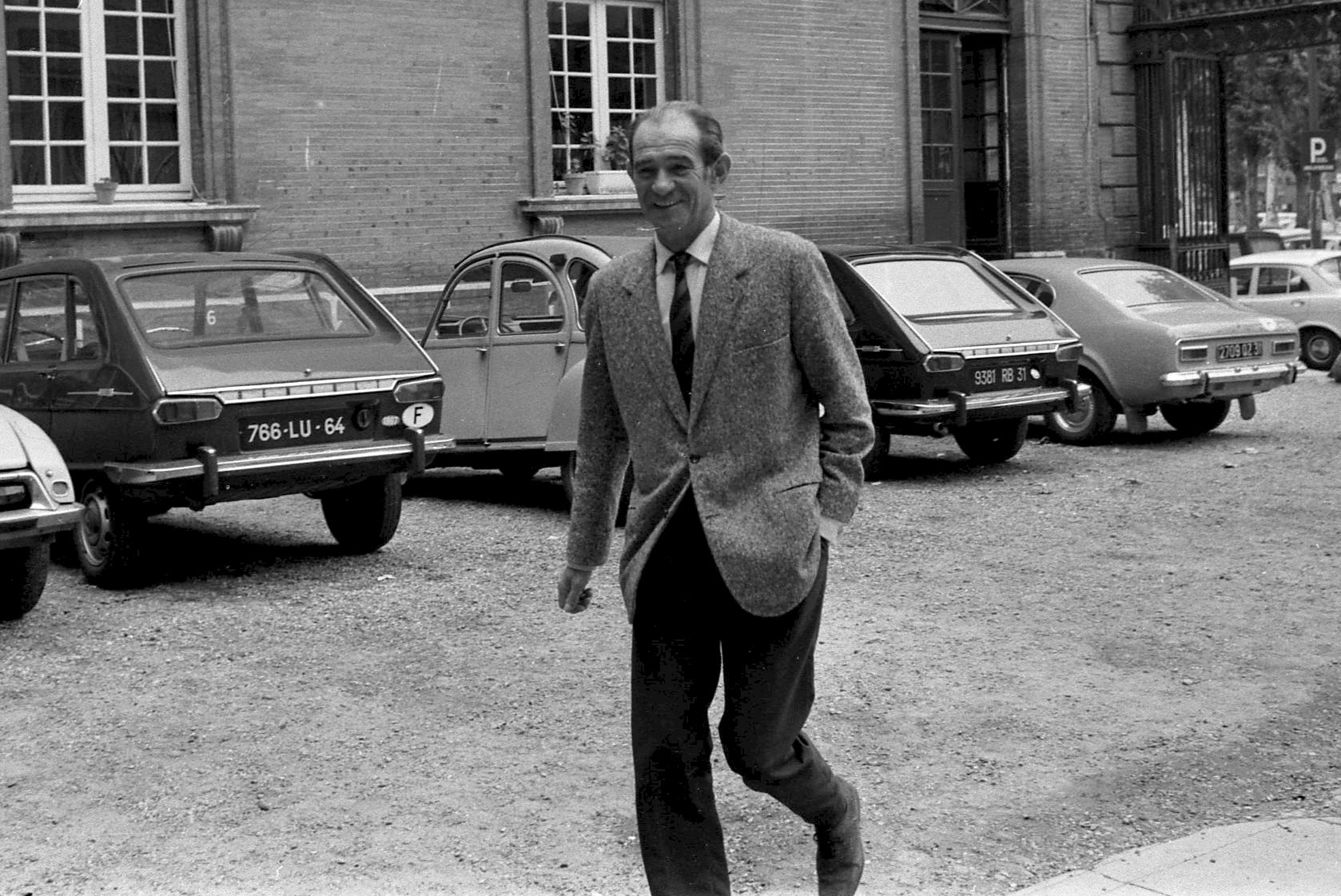 "Max Urbini, Riou, A. Dehaye, commissaire Boutevin". Cour du Palais de Justice. 5 octobre 1971. plan 3/4 de face d'André Riou (ancien entraineur du Toulouse Football Club) arrivant au tribunal, venu témoigner au procès. Cliché pris lors du procès de René Vignal (ancien footballeur), accusé d'une série de braquages perpétués à Toulouse et dans la région bordelaise entre 1969 et 1970. Observation: Au côté de René Vignal, comparaissaient également MM. Francis Bataille, Roger Claverie, Roger Martin, Marcel Filiol, Jean-Pierre Arrou, Guy Martin, René Doncel et Jean-Louis Parrenin.